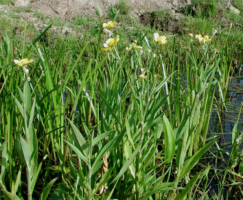 Ranunculus Lingua, Zungen-Hahnenfuß, typisches Vorkommen